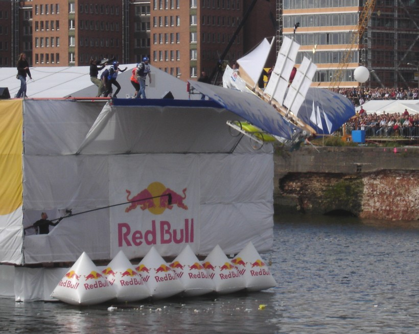 Red Bull Flugtag 2004 in Hamburg, HafenCity. Eigene Aufnahme, GNU-FDL